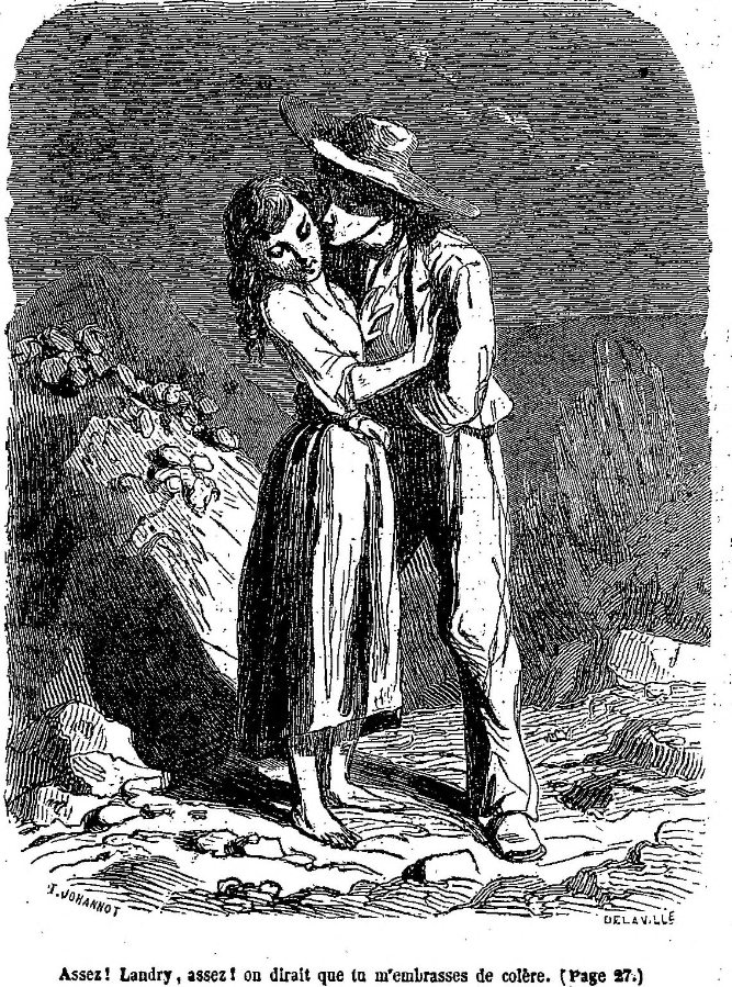 George Sand illustrée par Tony Johannot et Maurice Sand. La Petite Fadette, de George Sand, Paris, Michel-Lévy frères, 1851 (réédition illustrée du roman initialement paru en 1849).